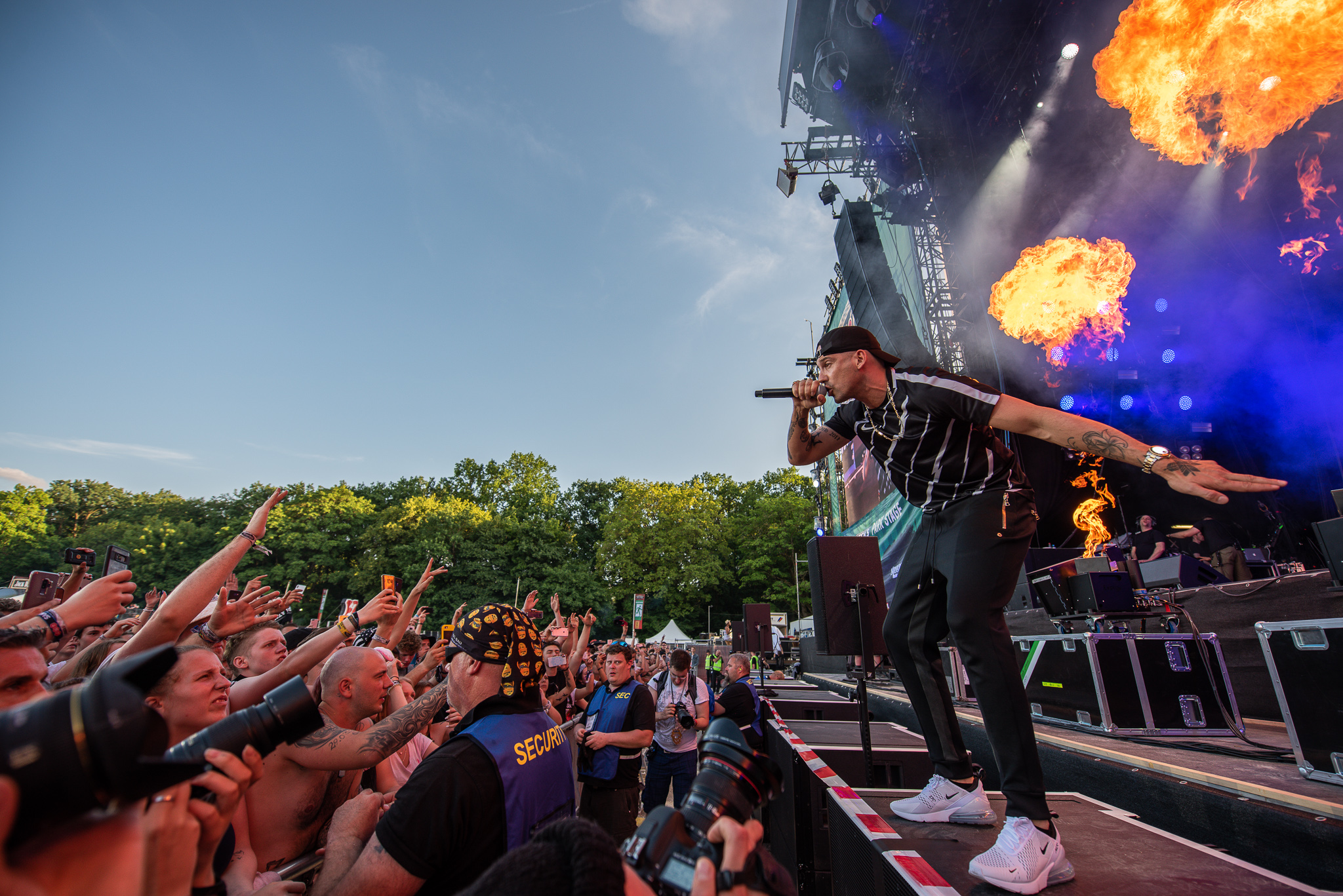 ARGO-Konzerte,Beck's Park Stage,Festival,Konzert,Livekonzert,Livemusik,Musik,RAF Camora,RiP,Rock im Park 2018